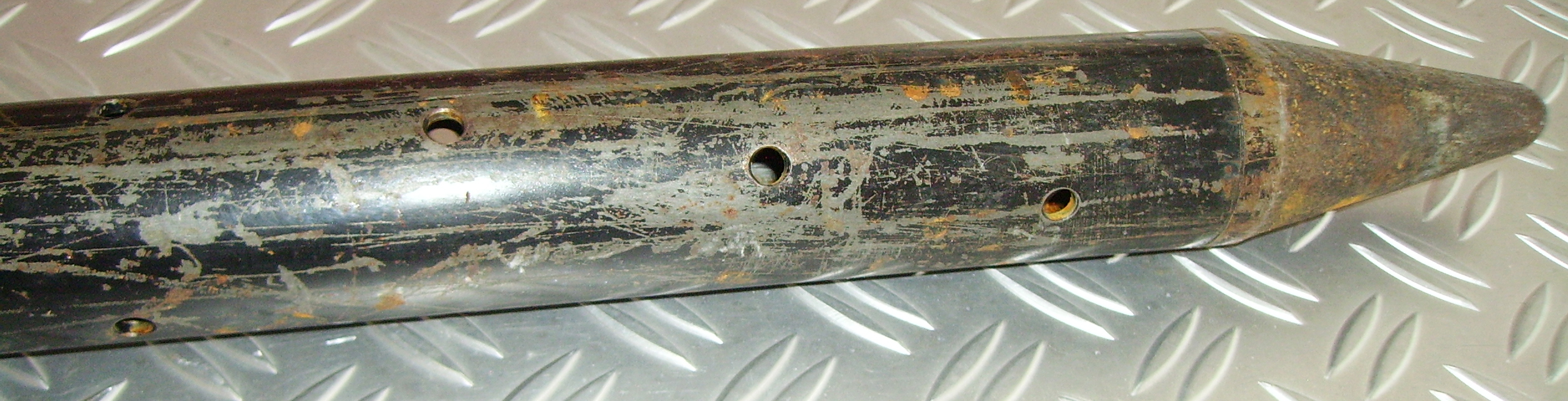 Spitze einer Löschlanze mit spiralförmig angeordneten Löchern